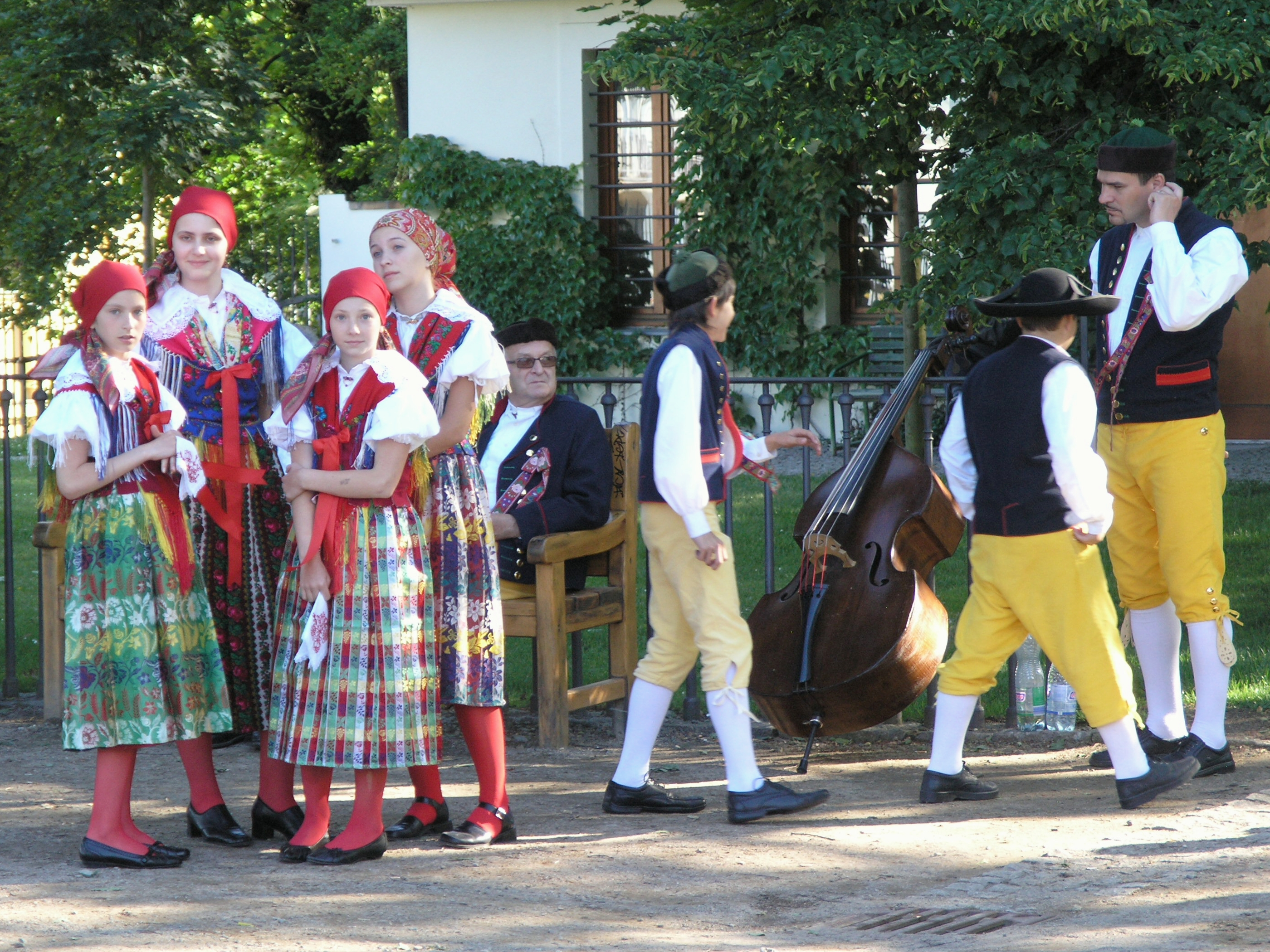 X. Národopisná slavnost v Kinského zahradě - Národopisný soubor Postřekov